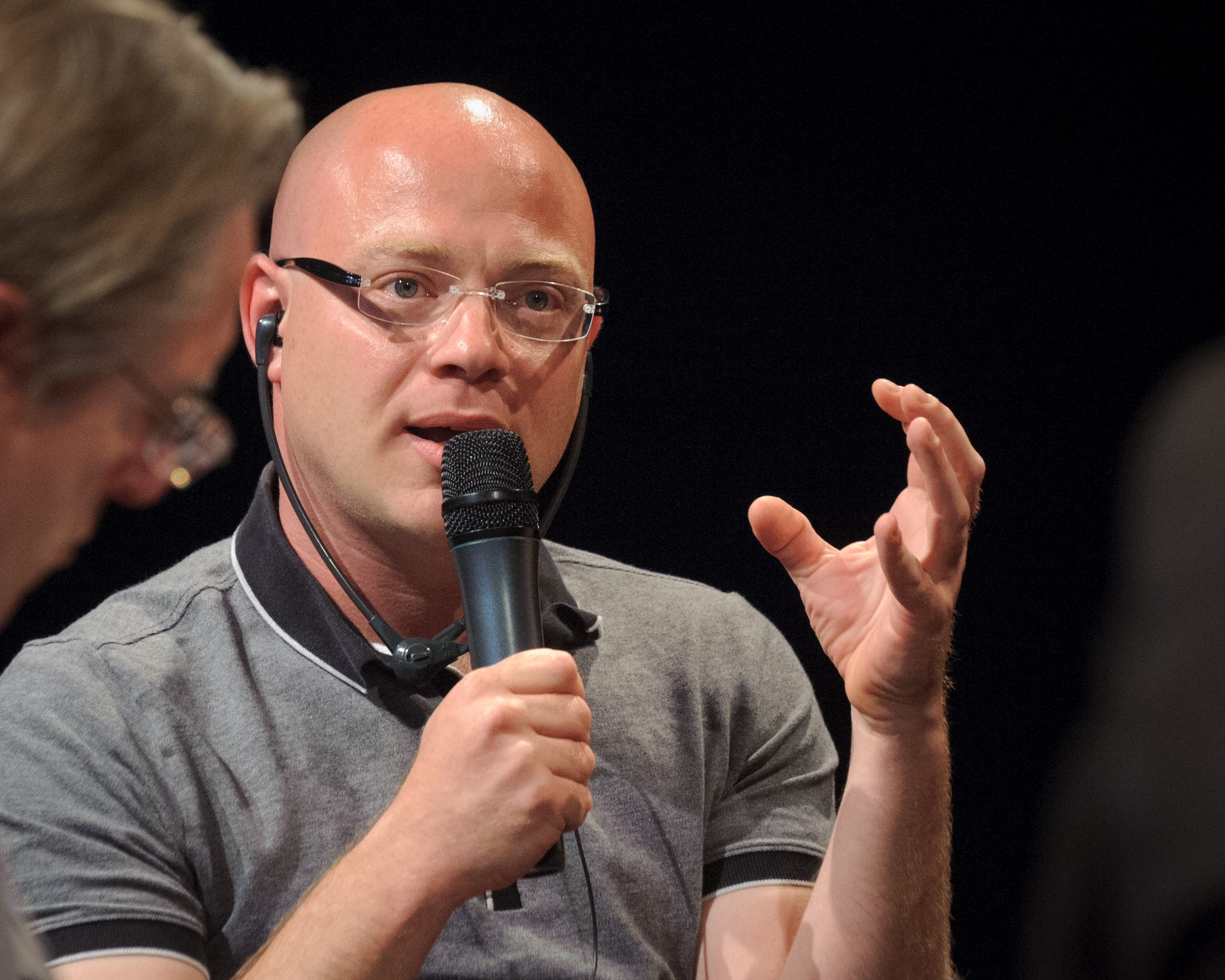 Amichai Shalev (Schriftsteller, Israel) Foto: Stephan Roehl